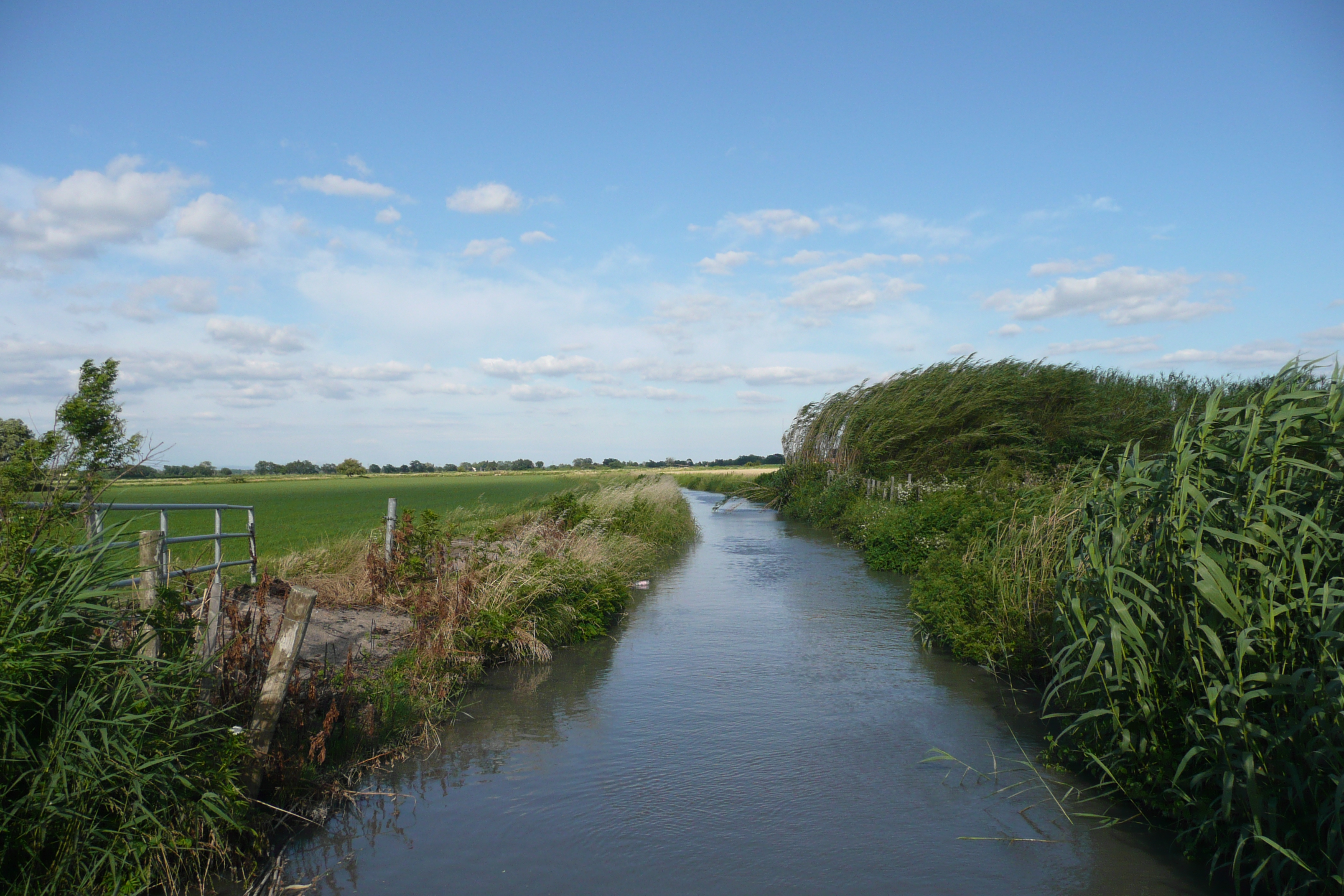 Canal d'eau près d'Arles en Camargue.